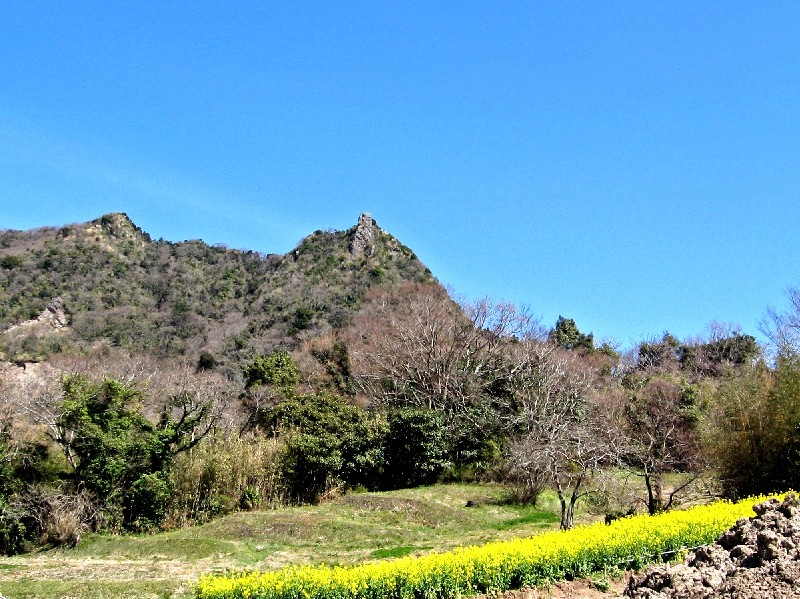 Mt.Iyogatake in Chiba,Japan